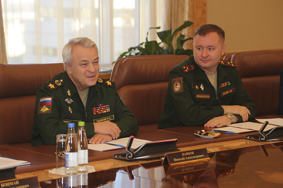 заместитель Министра обороны Николай Панков и начальник ЦСКА полковник Михаил Барышев во время работы «круглого стола» по обмену передовым опытом, касающимся развития юнармейского движения в регионах России